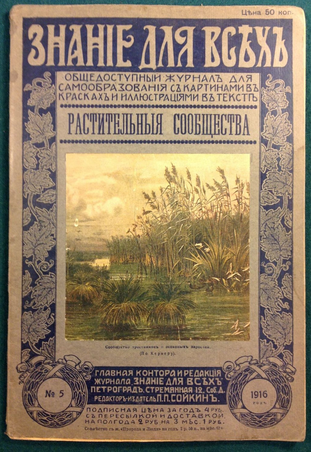 Обложка журнала "Знание для всех", №5, 1916 год